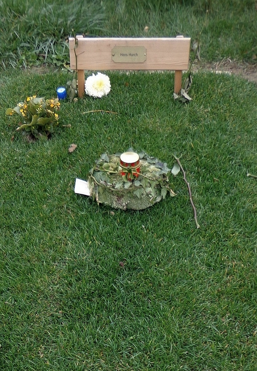 Wiener Zentralfriedhof - Gruppe 40: ehrenhalber gewidmetes Grab von Hans Hurch (2017)